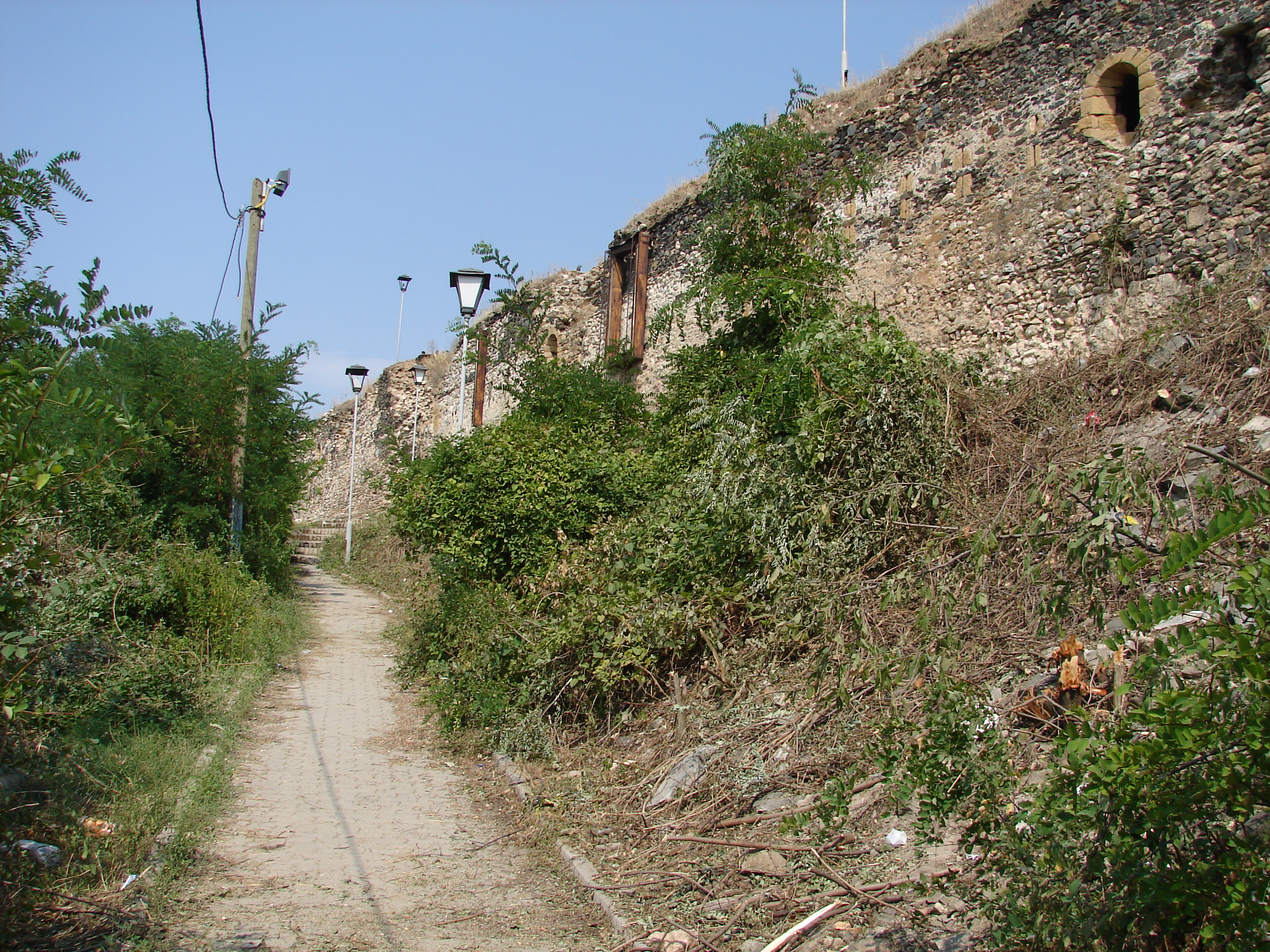 Kaljaja fortress above Prizren.